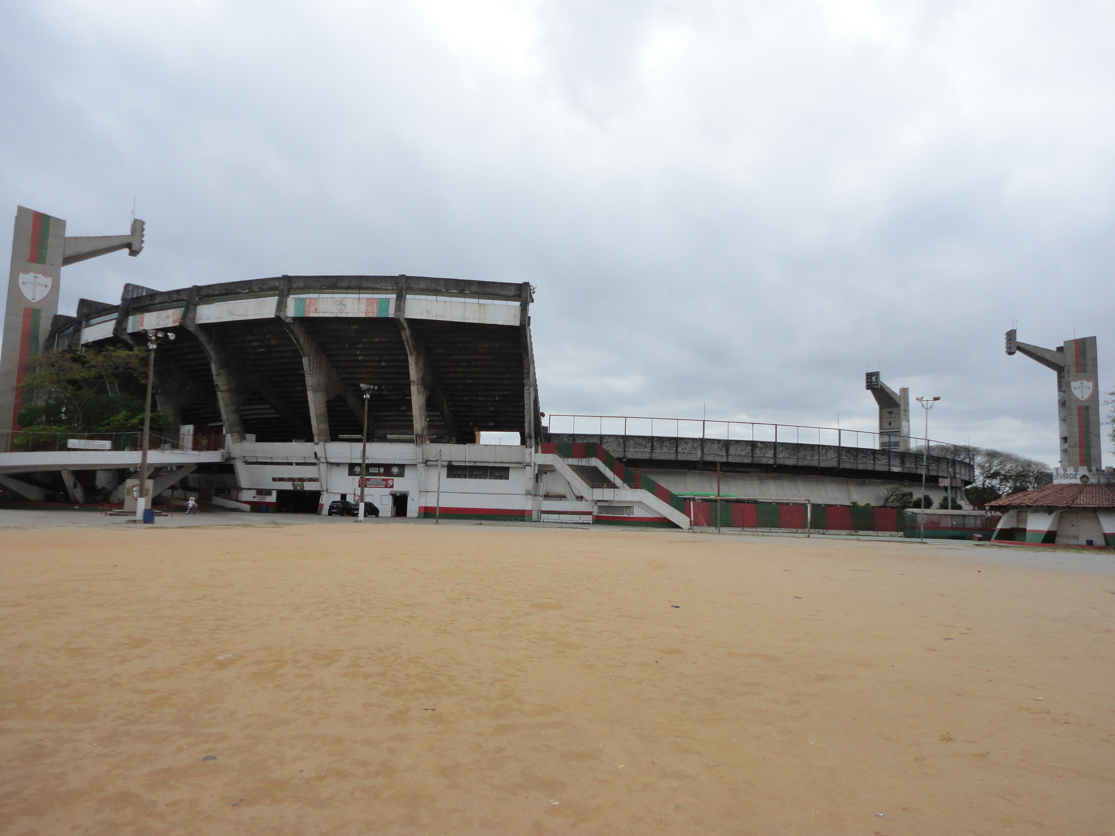 Vista externa do Canindé, em São Paulo, Brasil